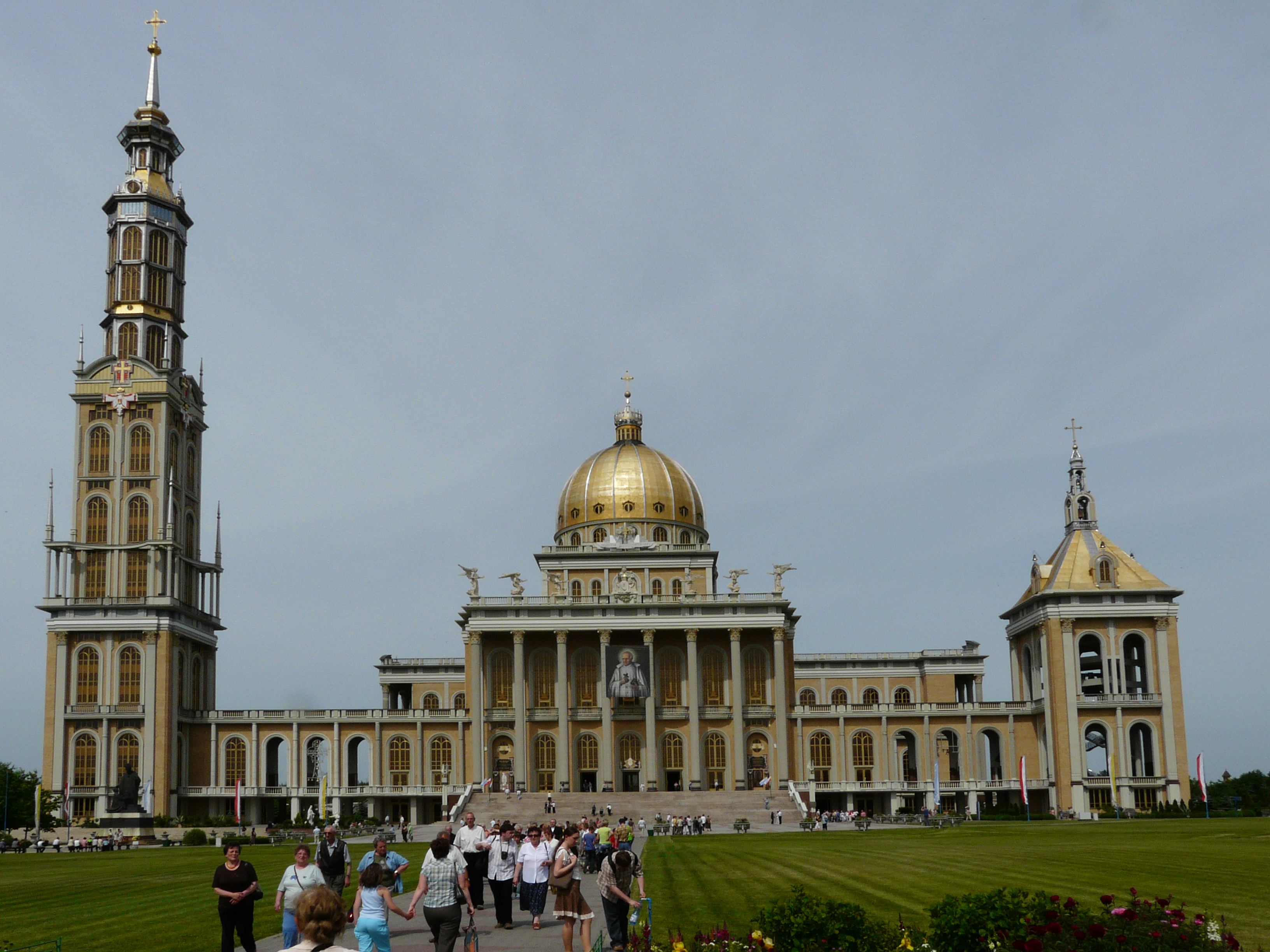 Licheń